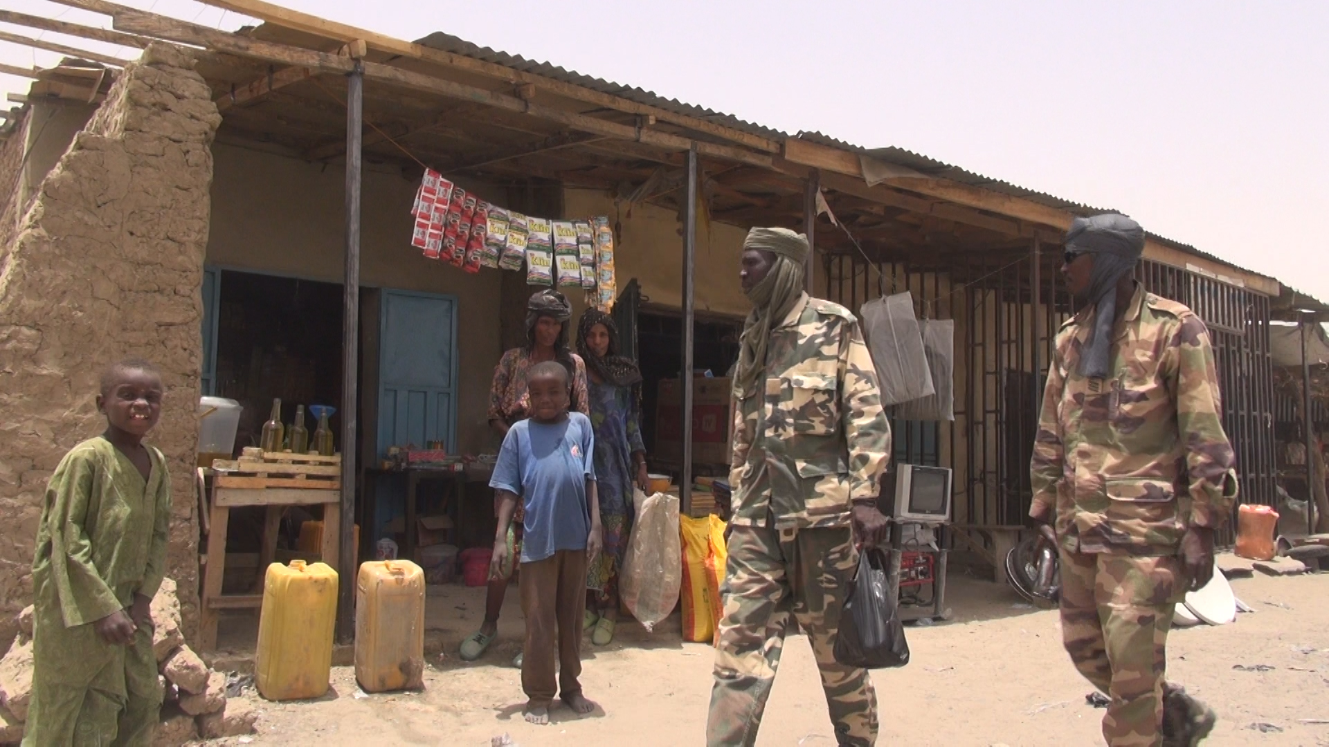 Des militaires tchadiens se promènent sur le marché de Bosso dans la région de Diffa, Niger, le 19 avril 2017 (VOA/Nicolas Pinault)